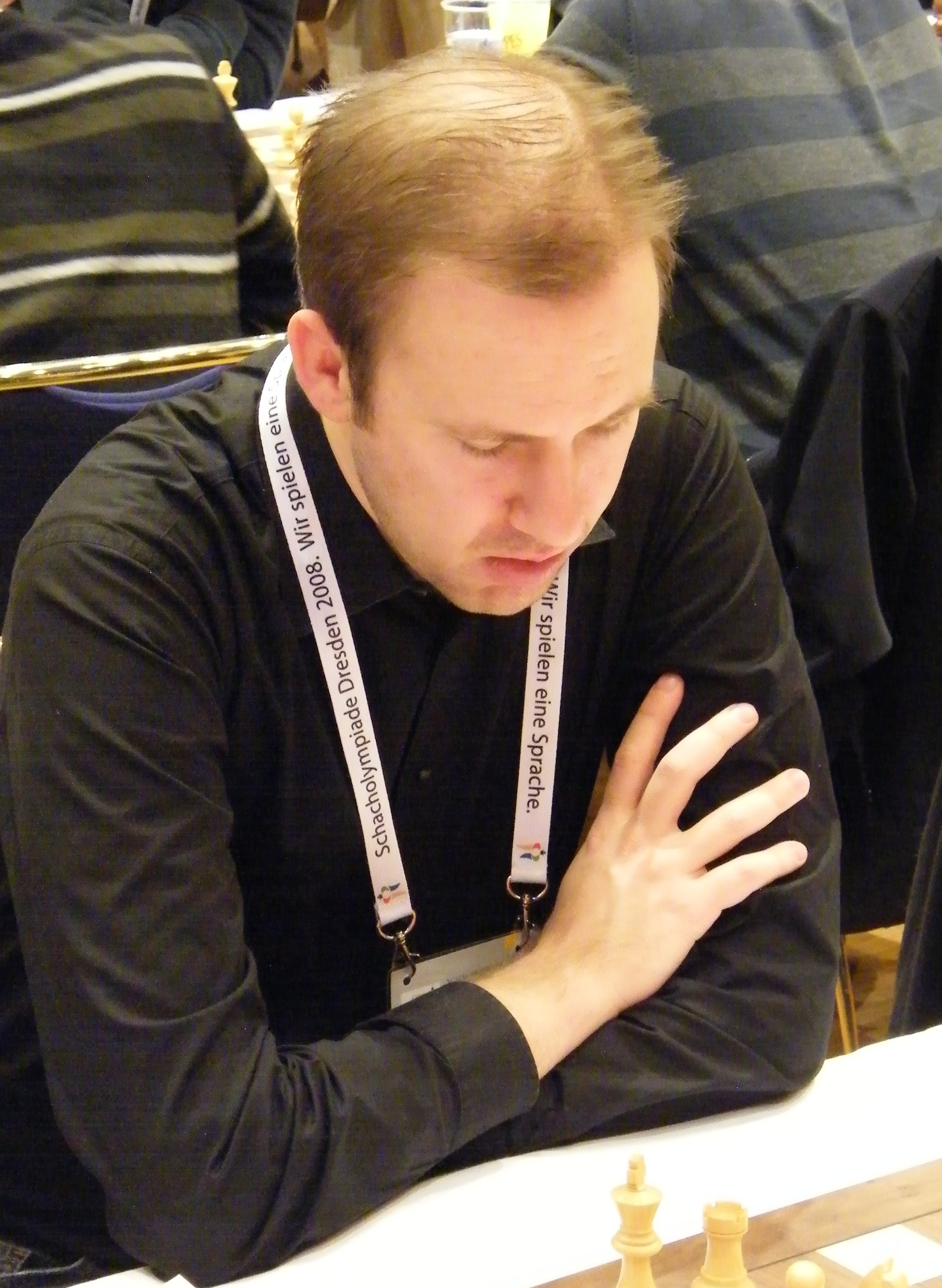 GM Florian Jenni bei der Schacholympiade 2008 in Dresden